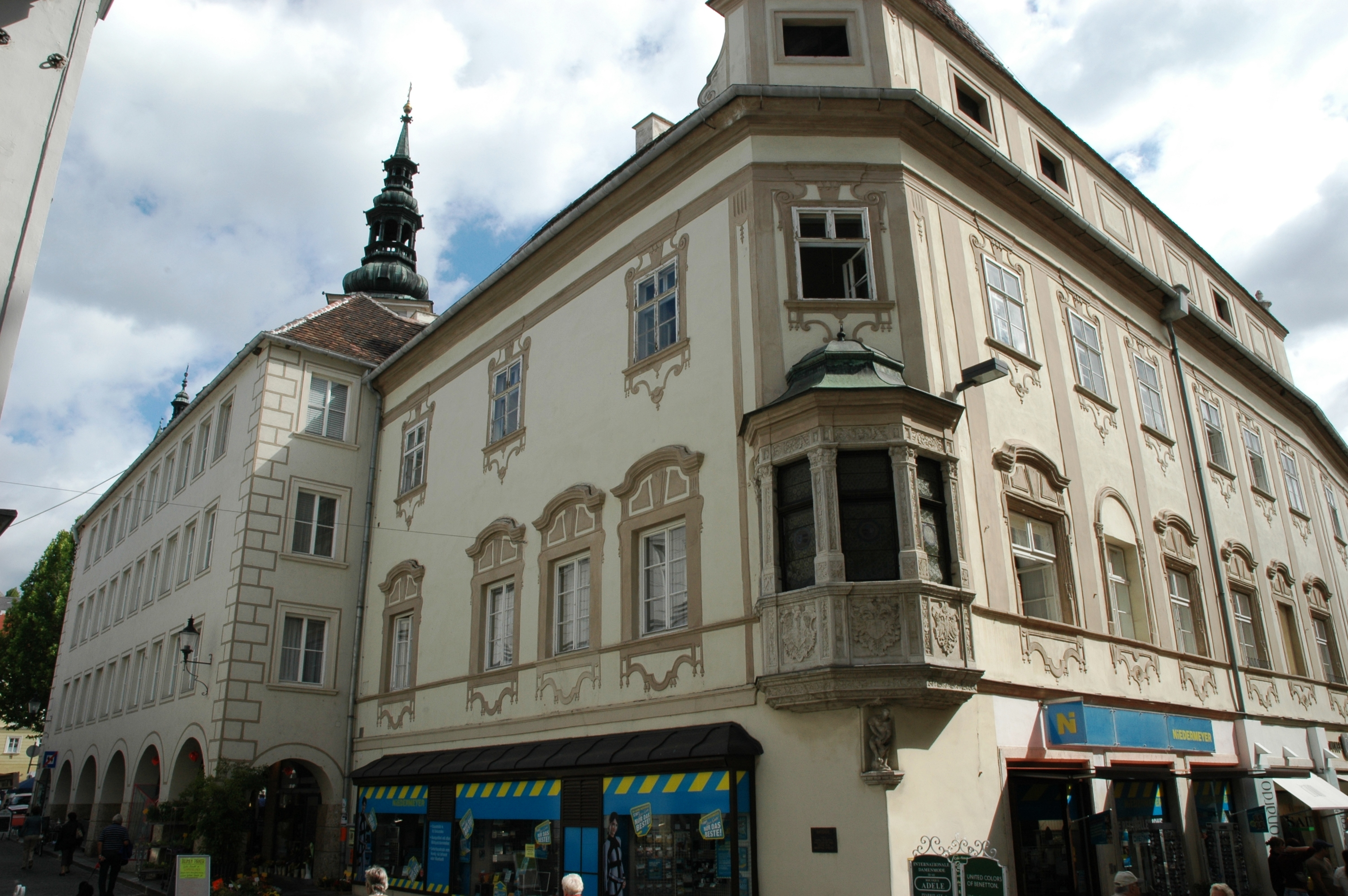 Rathaus d. Stadt Krems mit Rathauserker